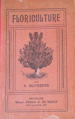 Adolphe Buyssens, Floriculture, Bruxelles, éd. A de Boeck, 1910.